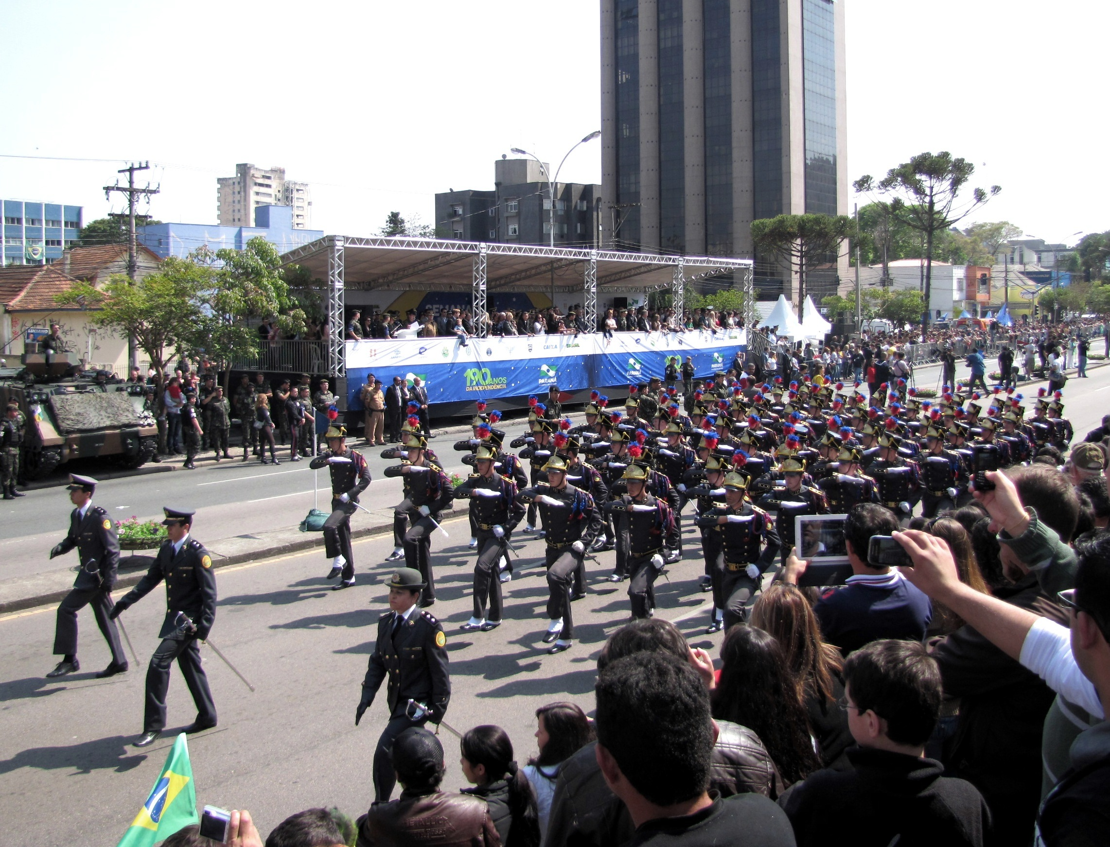 Desfile de 7 de Setembro de 2012 - Escola de Formação de Oficiais da PMPR.